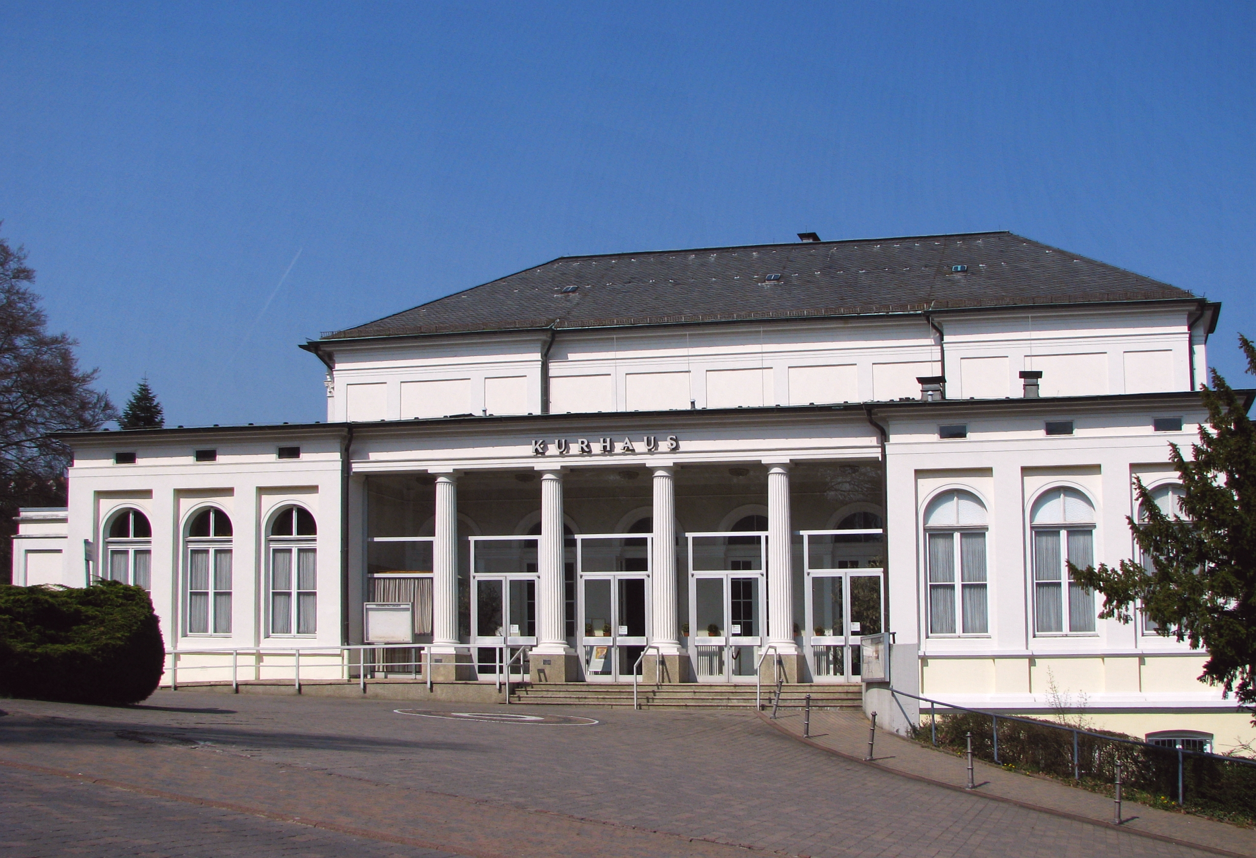 Bad Schwalbach Kurhaus am Kurpark Cursaal Bau Baumeister Ph. Hoffmann bis 1879 - Hessen - Foto Wolfgang Pehlemann IMG_4586